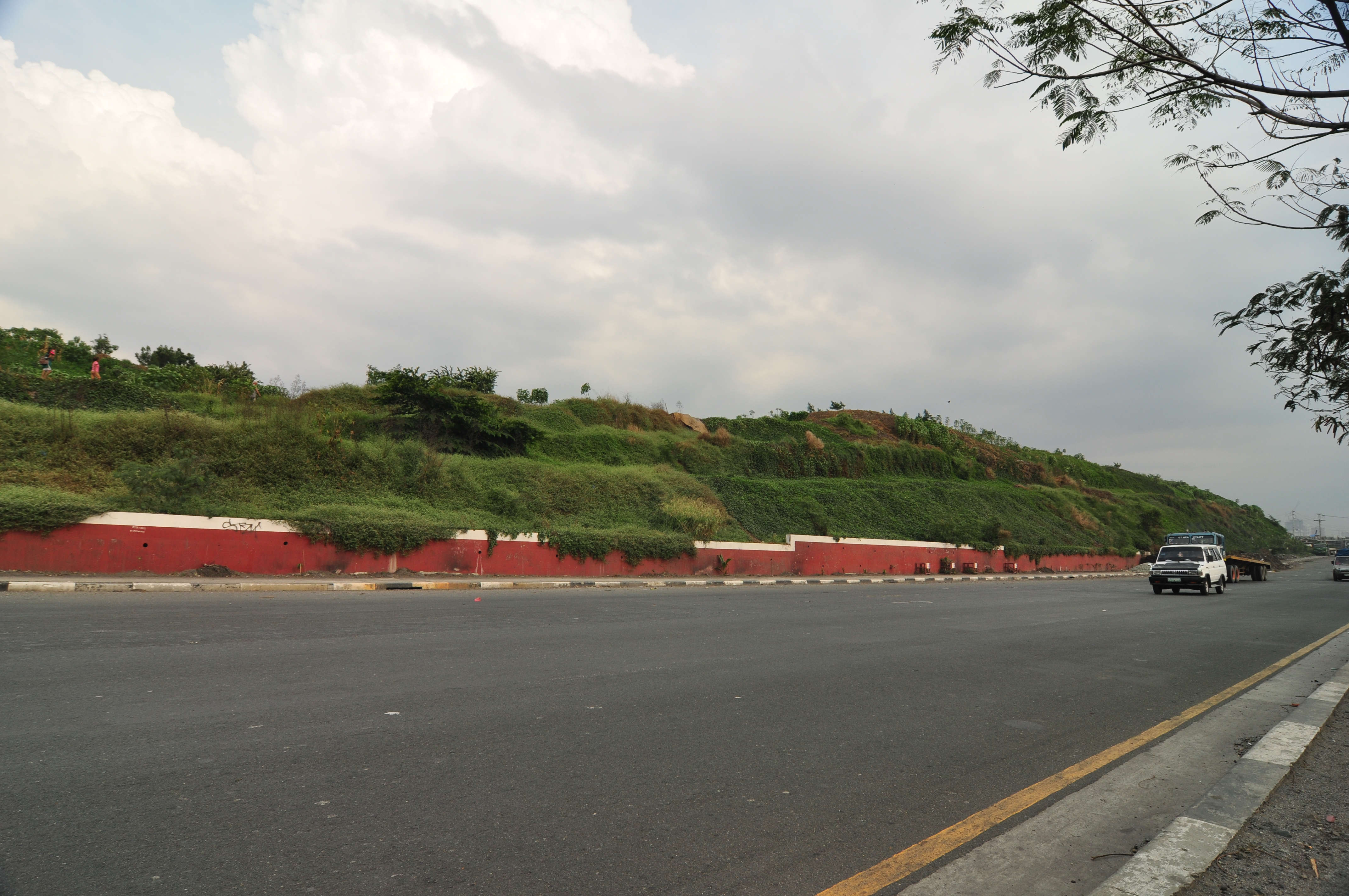 Smokey Mountain in Manila, Philippines